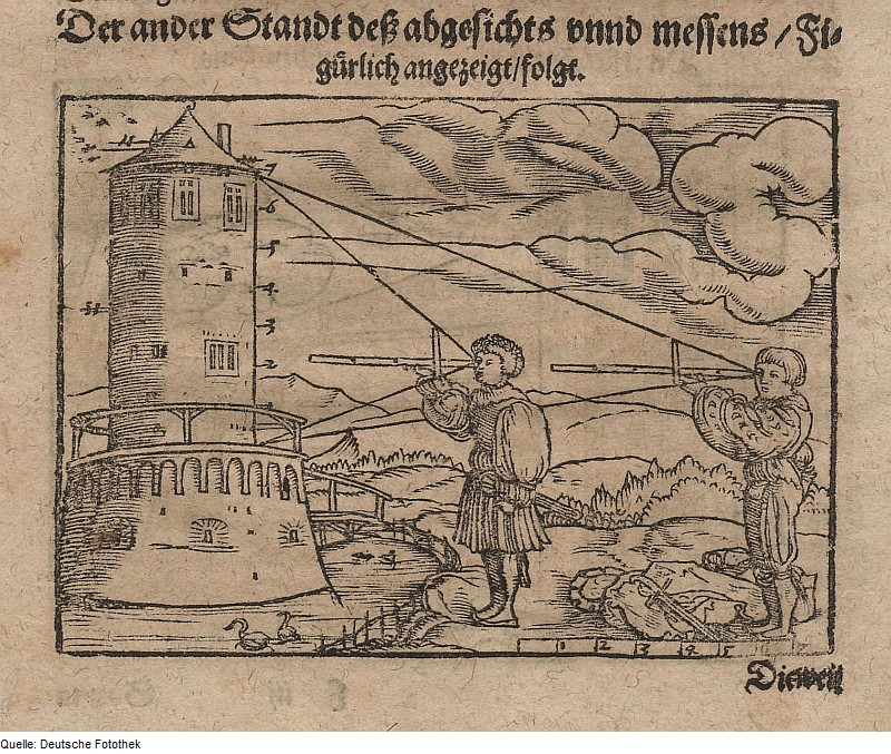 Original image description from the Deutsche Fotothek Geometrie & Vermessung & Vermessungsinstrument & Messstab & Jakobsstab & Turm